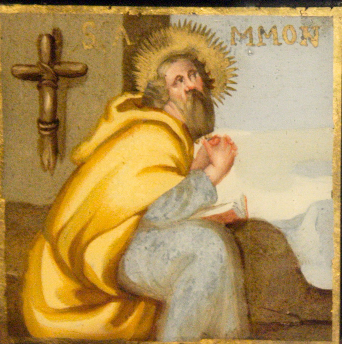 Sant Amon, va ser un eremita del segle IV